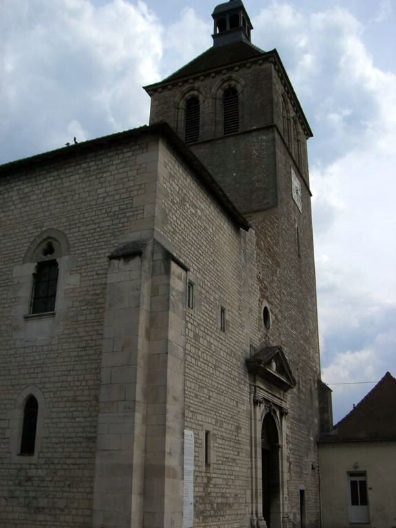 Prioratskirche Saint-Marcel bei Chalon-sur-Saône